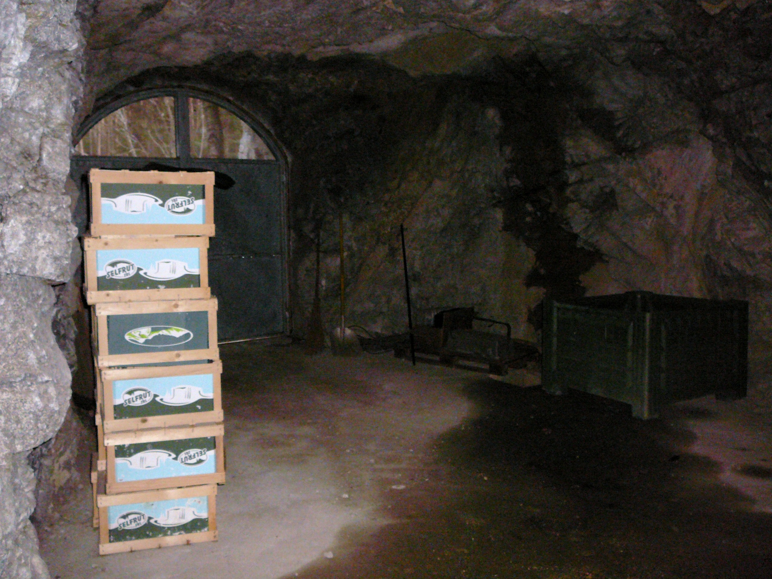 Opera_35 Sciaves